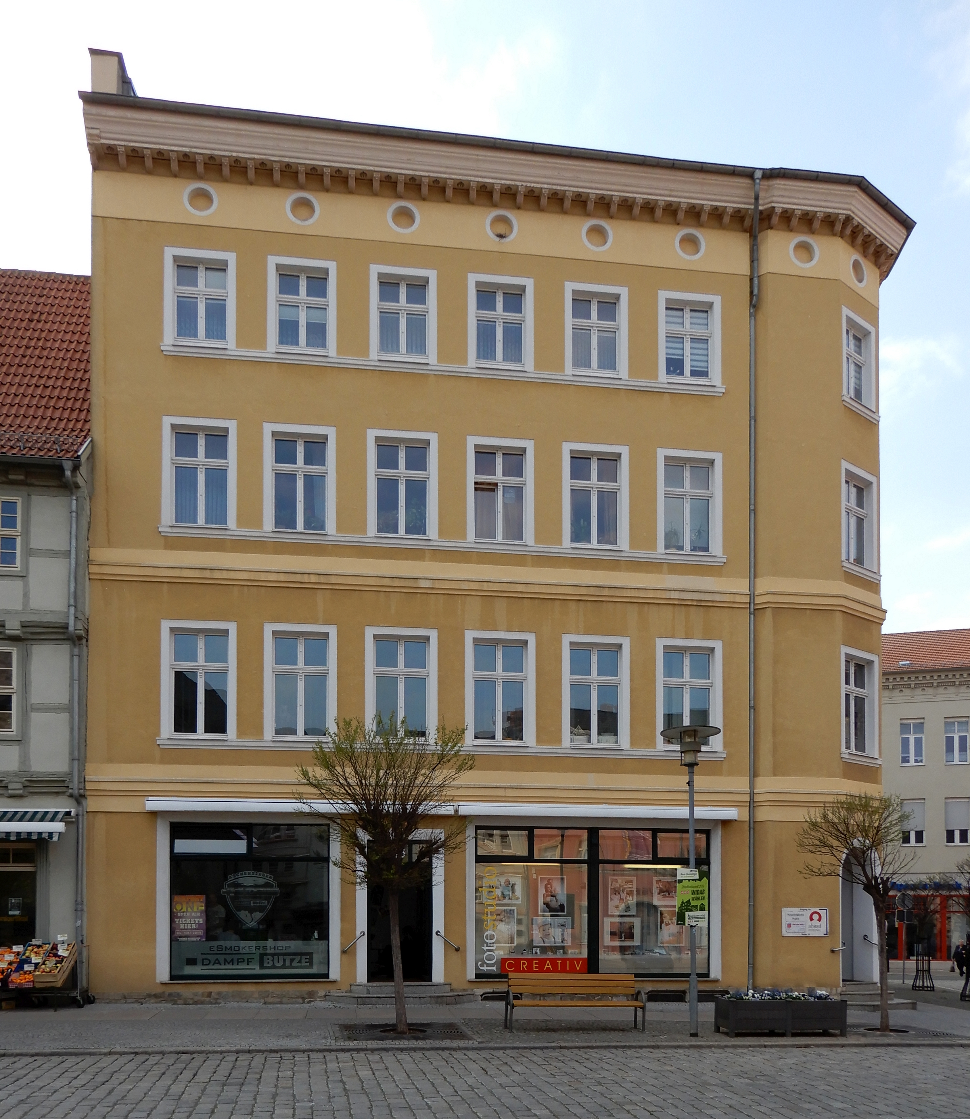 Gebäude Markt 25 in Aschersleben